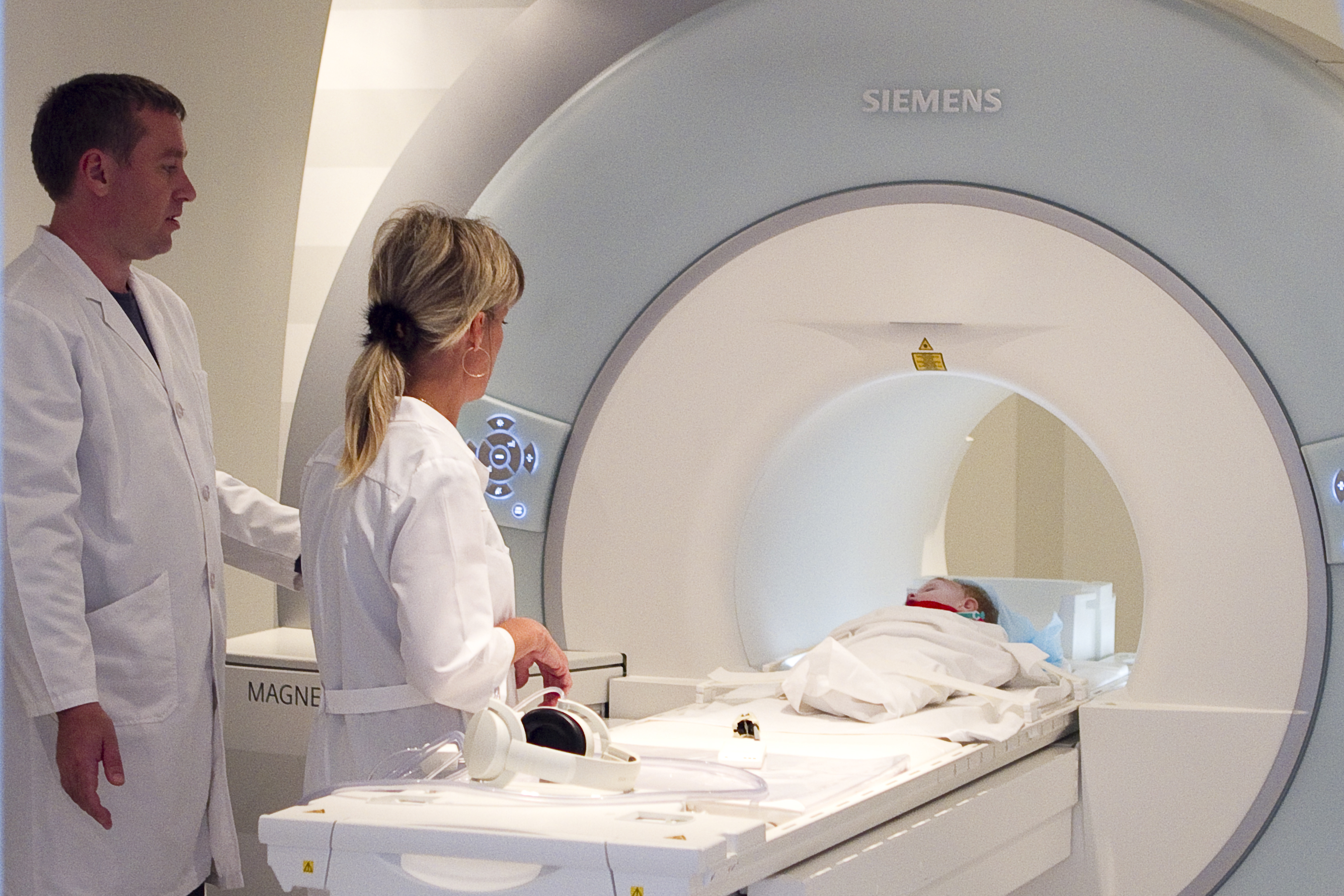 Поезд Здоровье